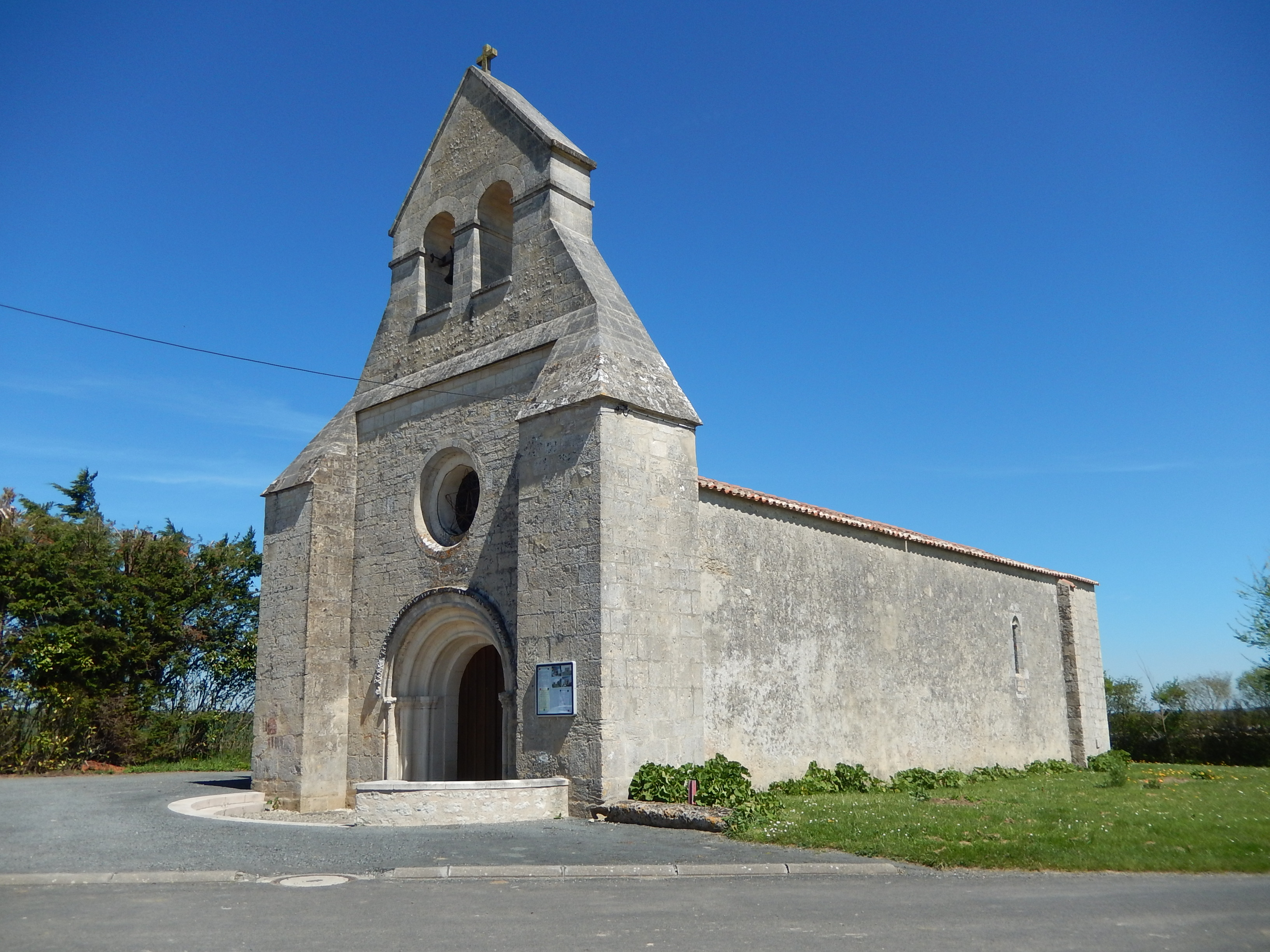 L'église Saint Laurent, construite au douzième et au quatorzième siècles, tombée en ruines depuis la chute du clocher en 1936, puis inscrite à l'inventaire des monuments historiques en 1948, et finalement restaurée jusqu'en 2005.